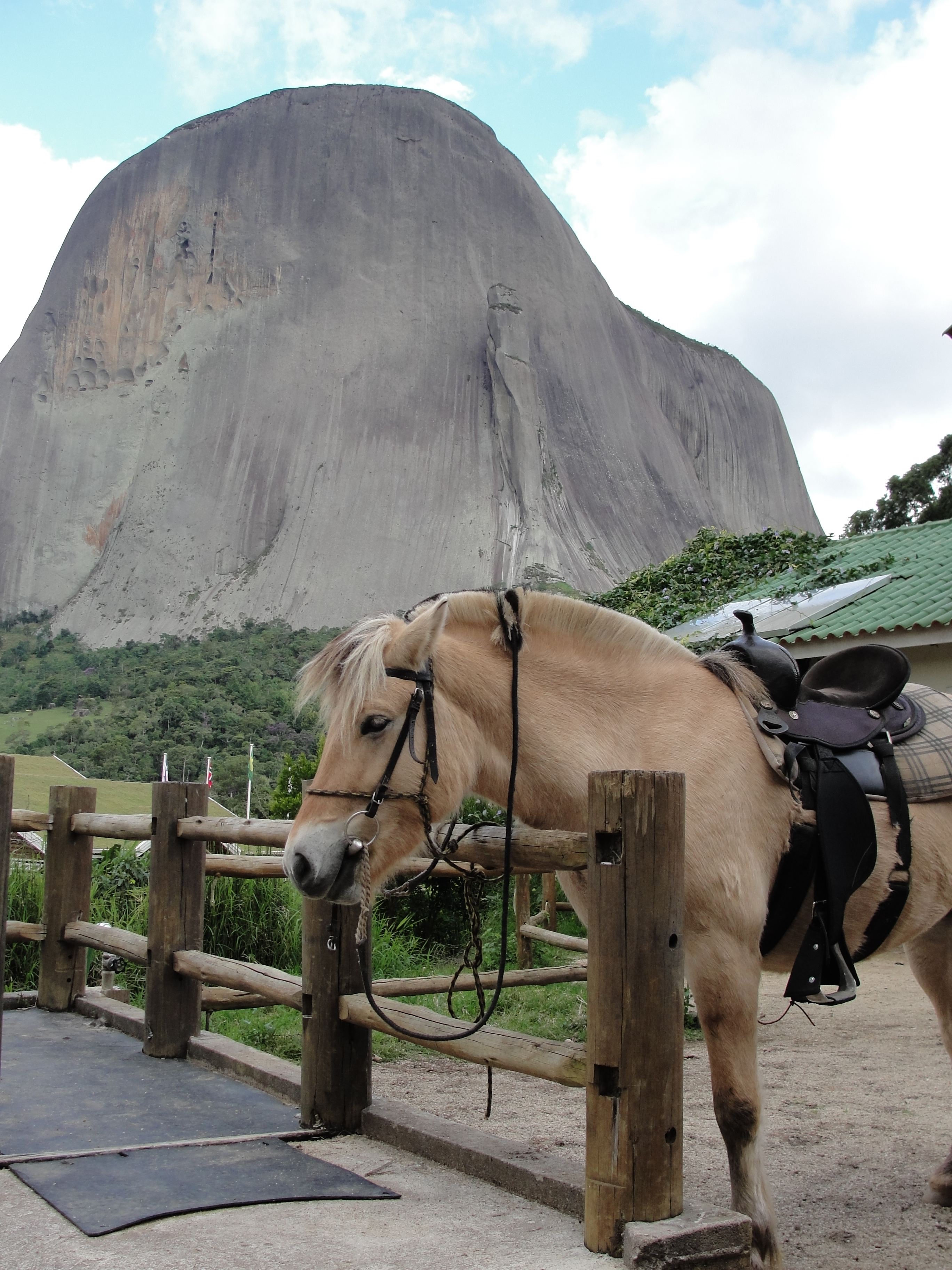 Fotografia tirada em um passeio ao Parque Estadual da Pedra Azul com a Pedra Azul (ou Pedra do Lagarto, devido ao seu formato) ao centro.